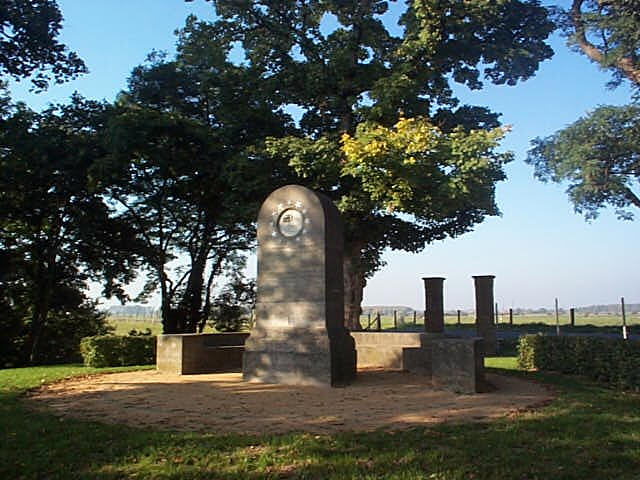 Denkmal für Johanna Sebus in Kleve-Wardhausen Fotografin: Karin Laakes